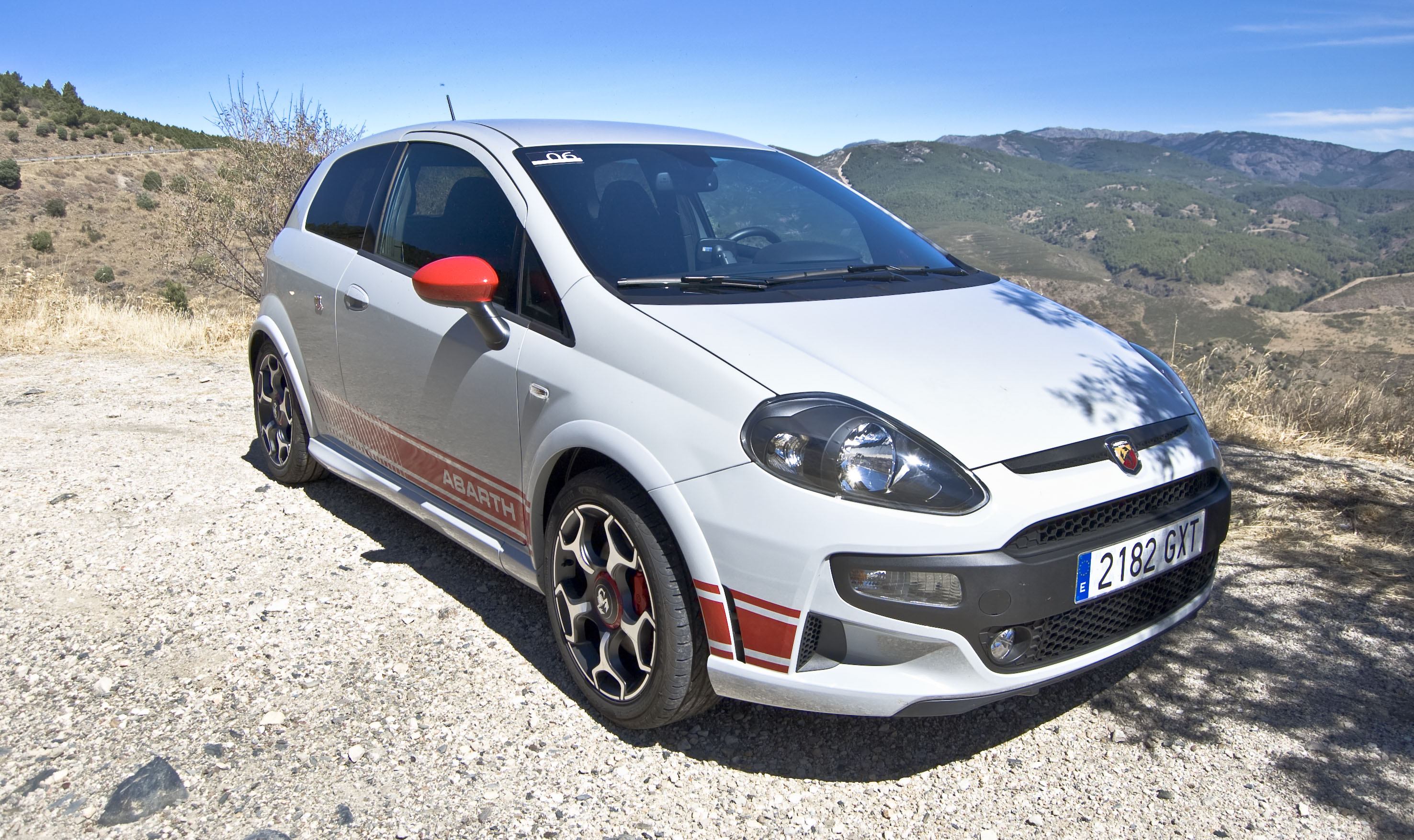 Prueba del Abarth Punto Evo en Diariomotor